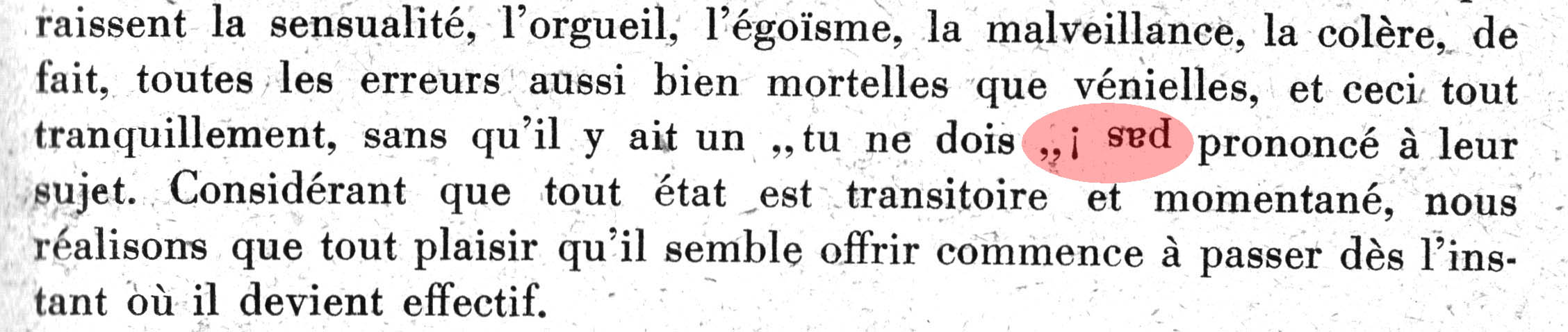 Mastic : erreur de typographie, un bloc de caractères se retrouve tête-bêche. Détail de la brochure "Esquisse du Bouddhisme : La Religion de la sagesse et de la compassion" (Lausanne?, ca 1950), p. 19.